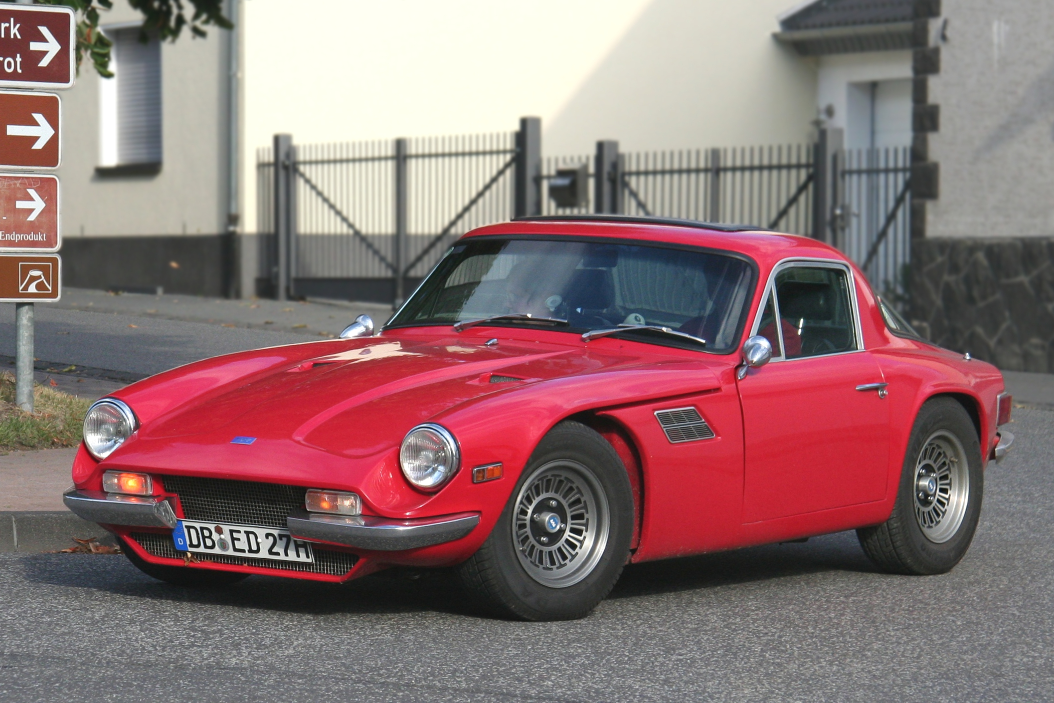 TVR 3000 M, Baujahr 1974, in Mendig (fiktives Kennzeichen)